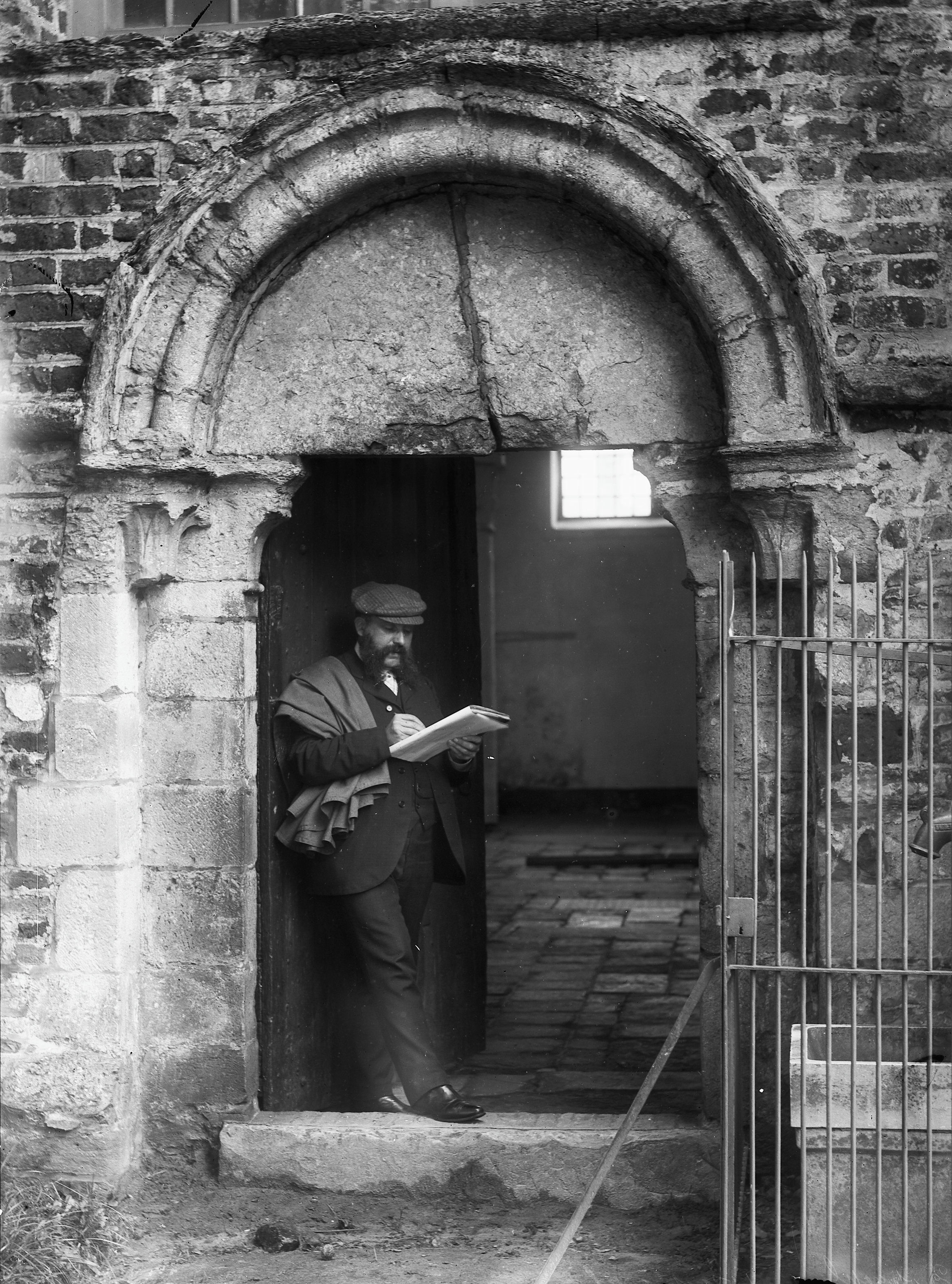 Sint Bavokerk: Natuurstenen toegang tot het schip aan de zuid-zijde, met Adolph Mulder poserend in de deuropening (opmerking: Fotonummer 5902)